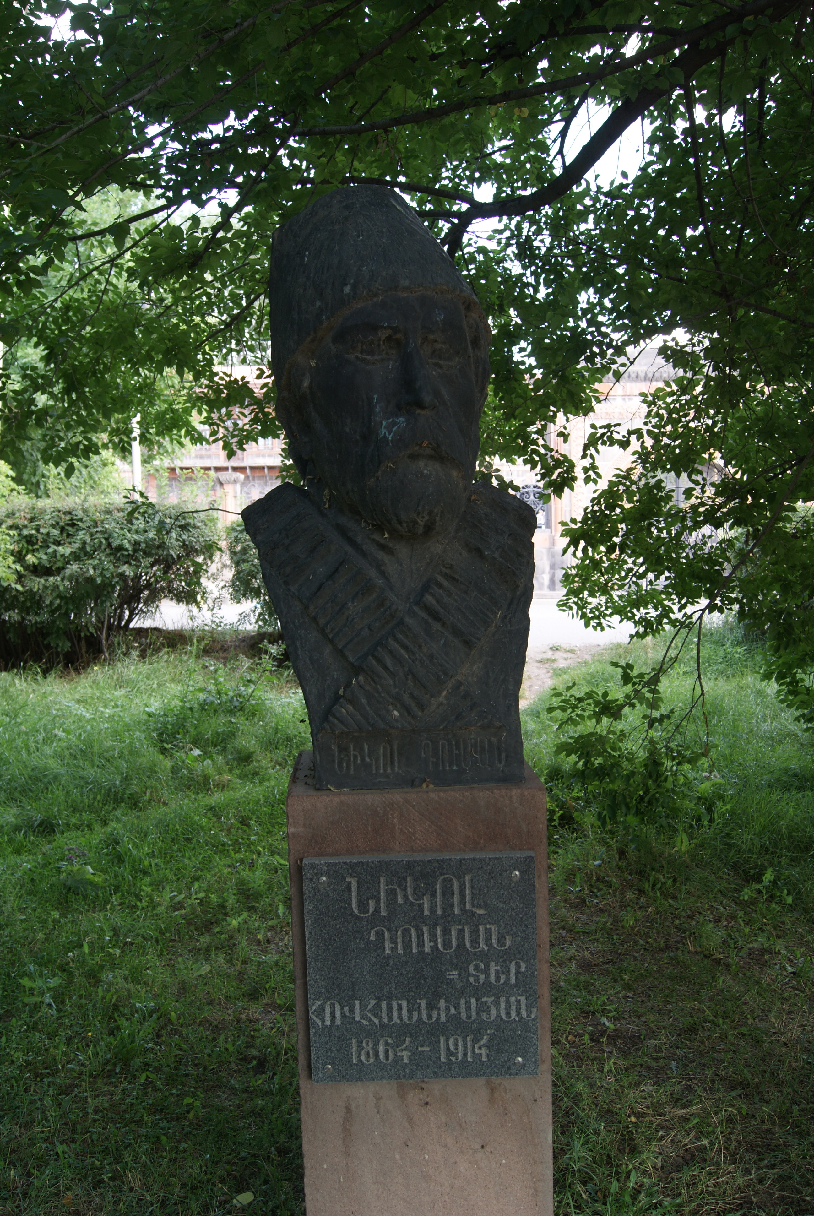 Գտնվում է Գյումրու Հաղթանակ զբոսայգում 1/4.876